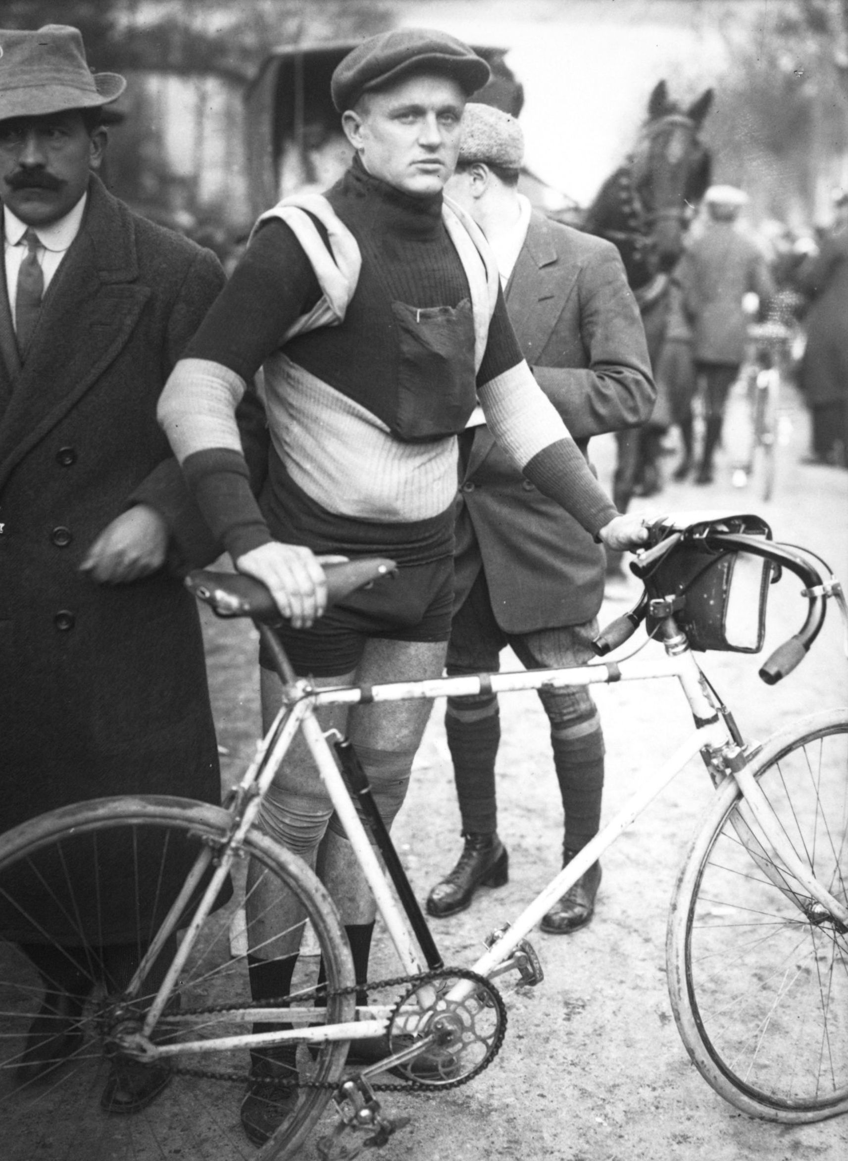 Omer Verschoore au départ du Paris-Roubaix 1913